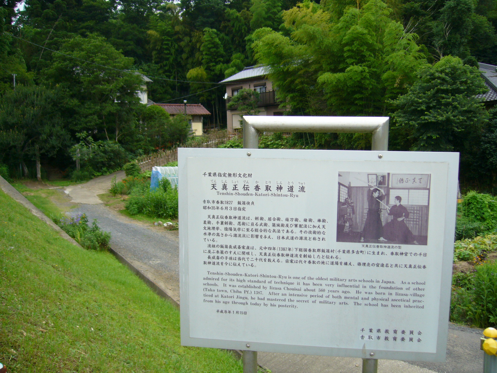 katori-shinto-ryu,doujyou-training-hall,katori-city,japan.